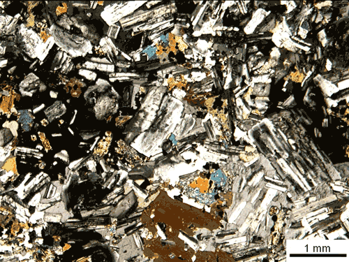 Monzonite. nicol incrociati